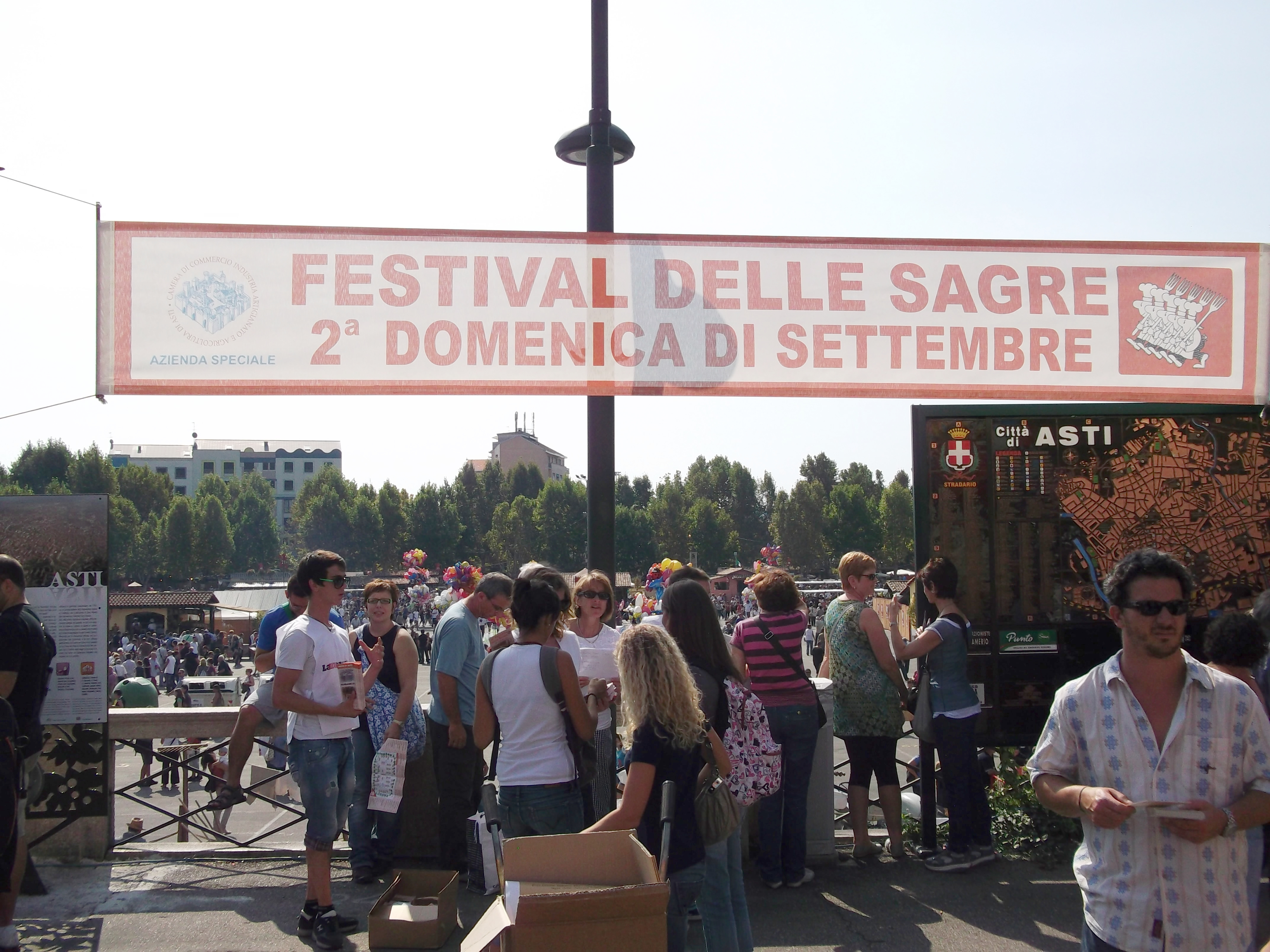 accesso alle sagre